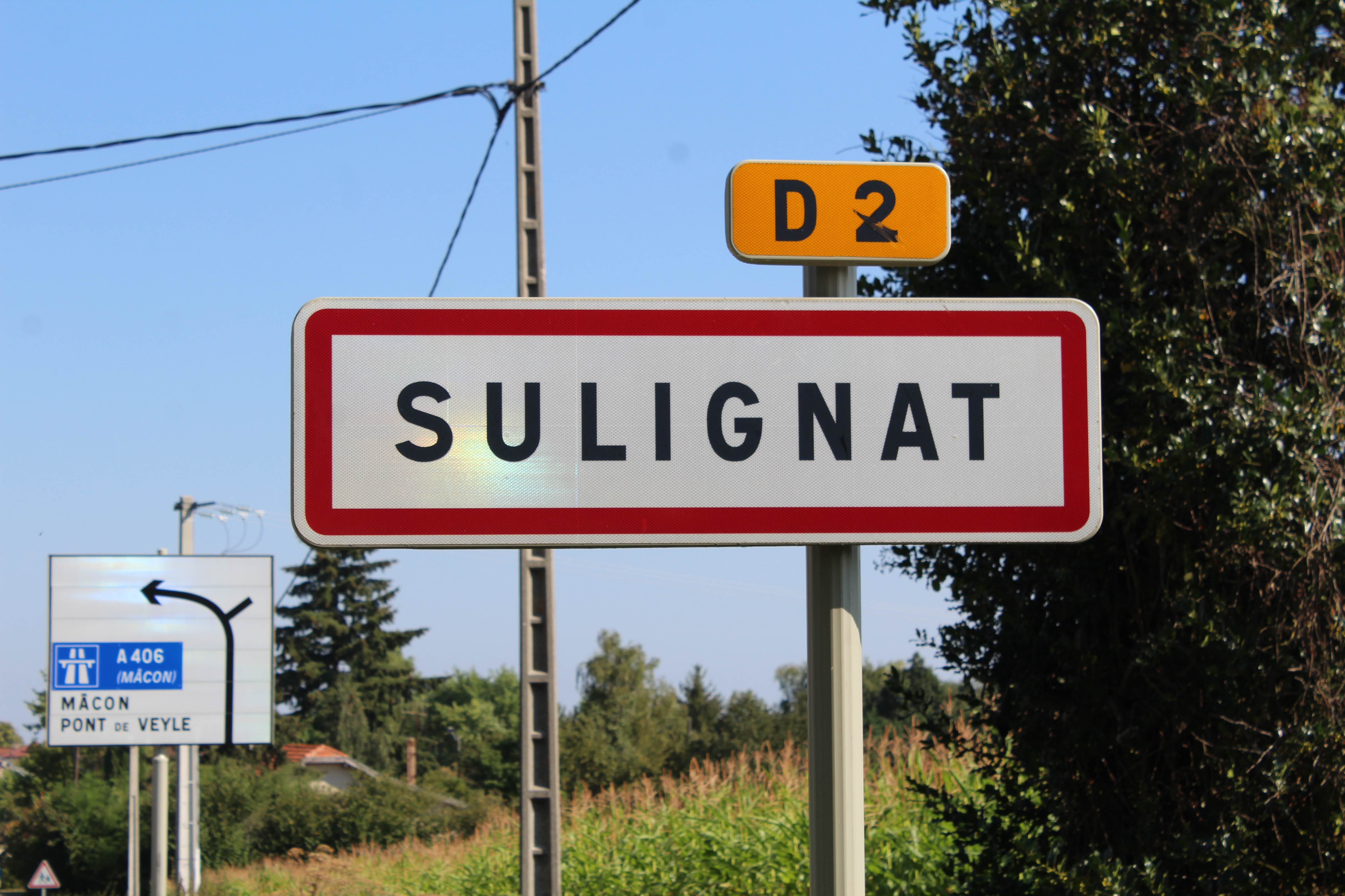 Panneau d'entrée dans le village de Sulignat.